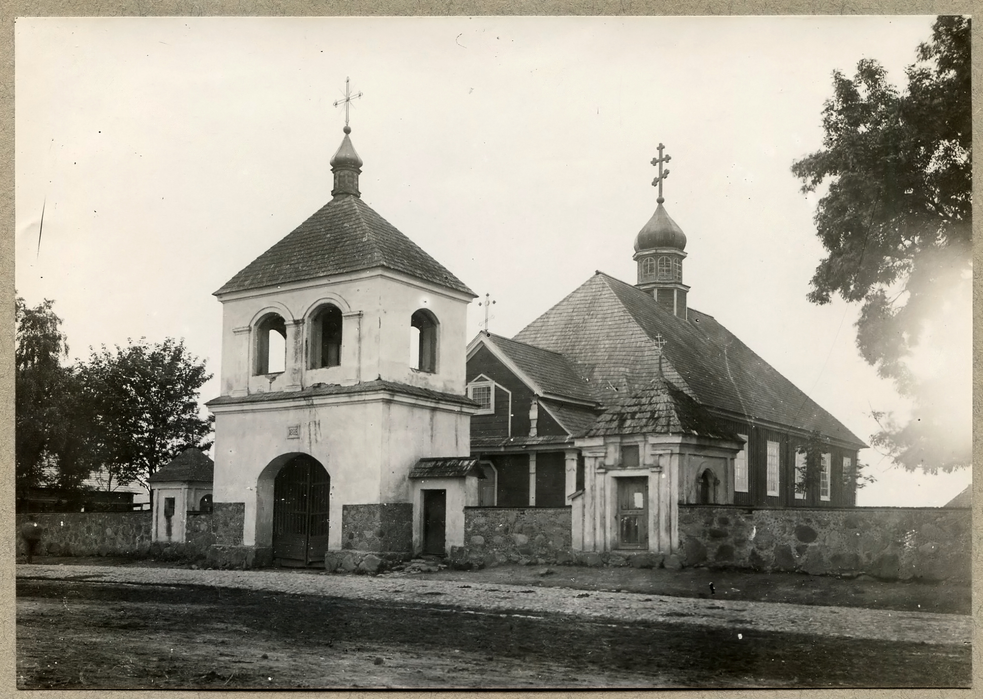 Цімкавічы, вуліца Нясвіжская. ЦаркваБеларуская (тарашкевіца): Цімкавічы (Cimkavičy), вуліца Нясьвіская (vulica Niaśviskaja). Царква